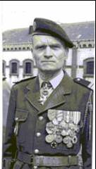 Le lieutenant-colonel Pierre Vincent lors de la remise des insignes de Commandeur de la Légion d'honneur, 30 juin 1962